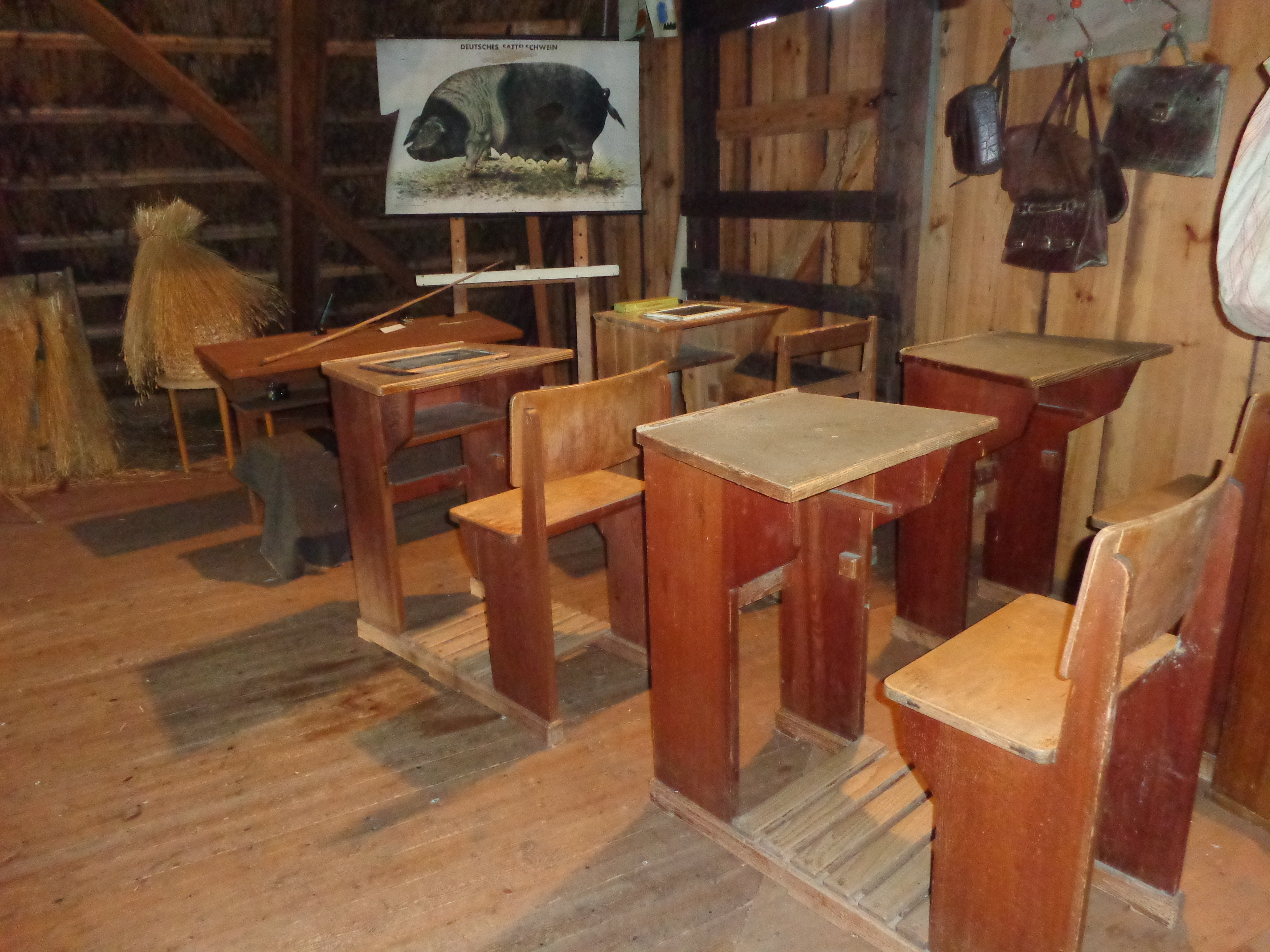 Grundschulgestühl im Wolhynien-Museum Linstow